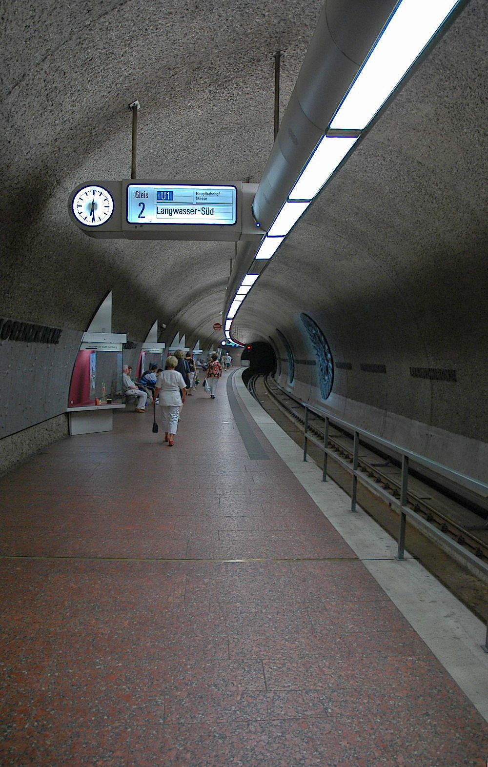 Der U-Bahnhof 'Lorenzkirche' in Nürnberg